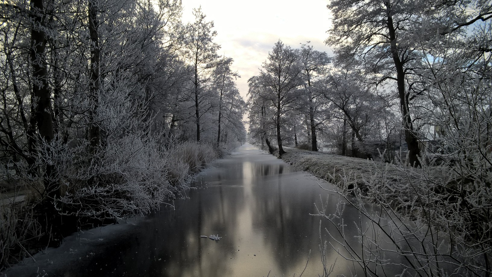 Pierswijk naar het zuiden